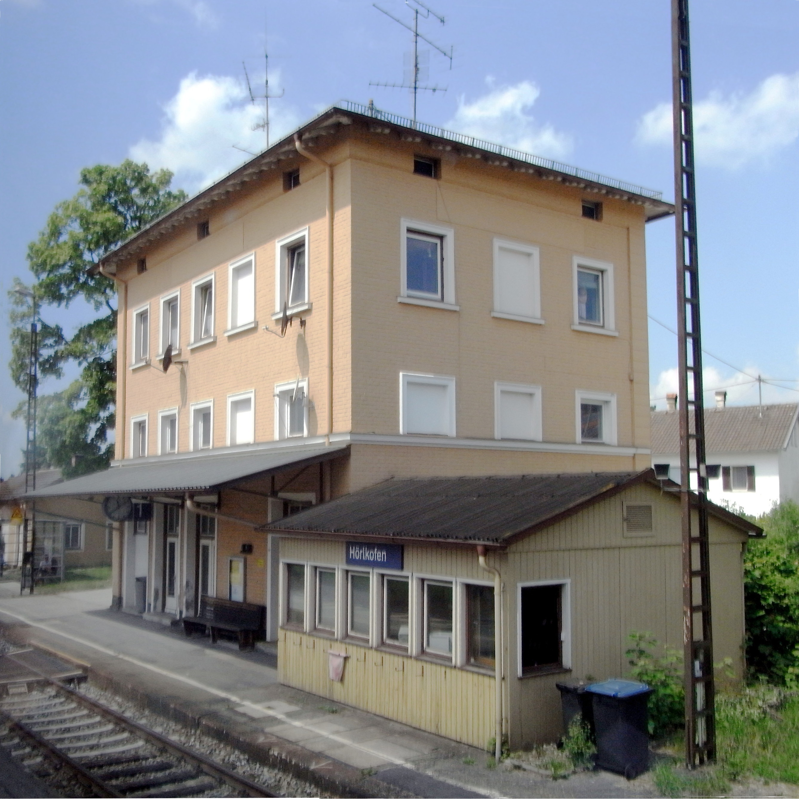 Bahnhof Hörlkofen von Osten gesehen.